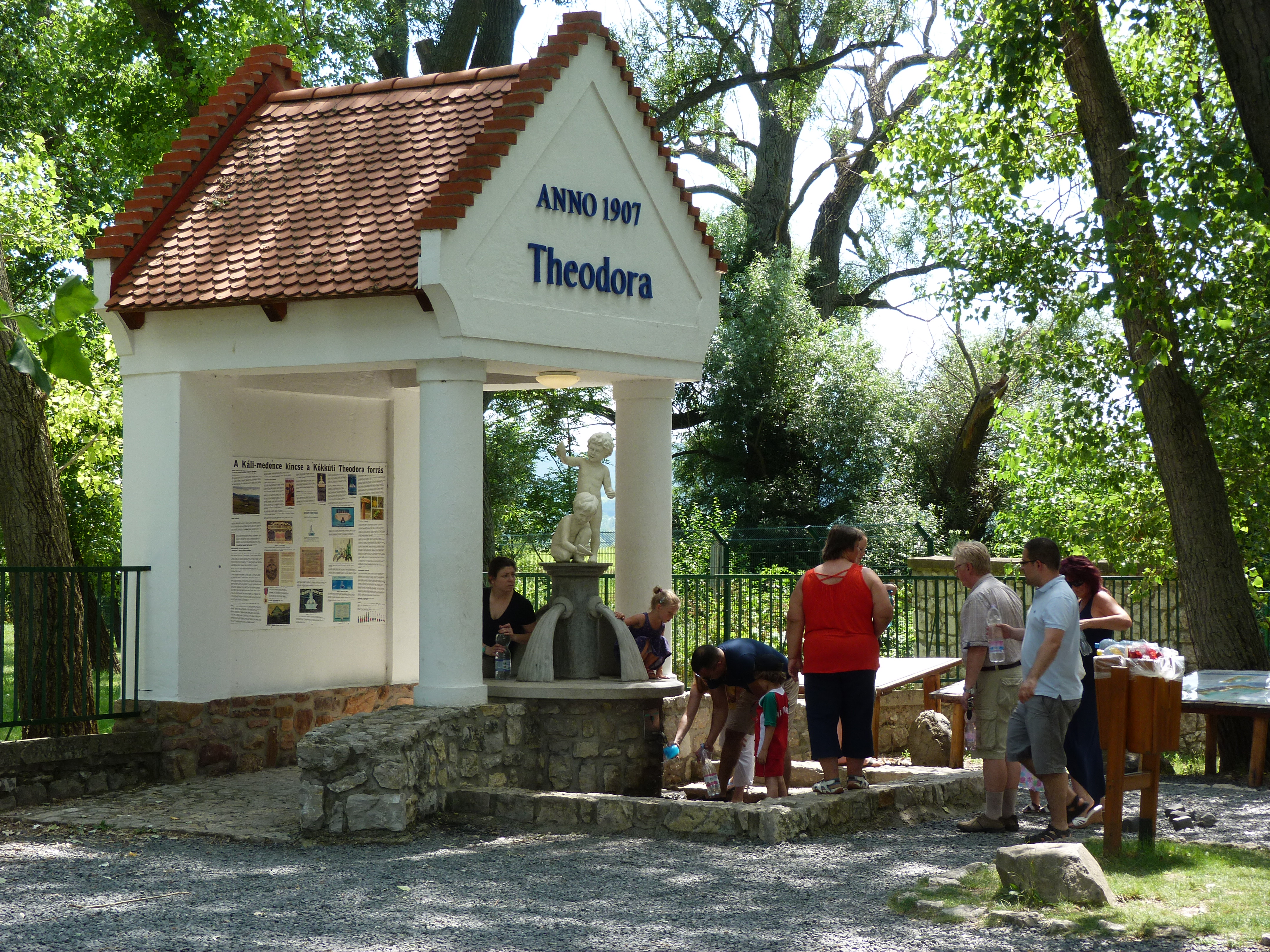 A felvételek 2014. július 6-én készültek Kékkúton, a Theodora forrásnál. Mérések szerint a kékkúti ásványvíz 13-000 – 16.000 éves. Megközelítése: Kékkútot Kővágóörs felé elhagyva, közvetlenül az út jobb oldalán forrásház és parkoló (3, 4). Hozama: közepes. A közelben indul a Theodora tanösvény a Ásványvíz Zrt. palackozóüzemétől, a Theodora Kereki forrástól (GPS: 46.8546795524, 17.5669915335), majd a Sásdi patak mentén a Kornyi-tó irányában halad. Forrás: Dr. Dobor Irma Kétezer év a Kékkúti ásványvíz életében Nemzeti Park Magyar Ásványvizek Cimkék: Kékkút Theodora Forrás Kékkúti Ásványvíz Zrt.